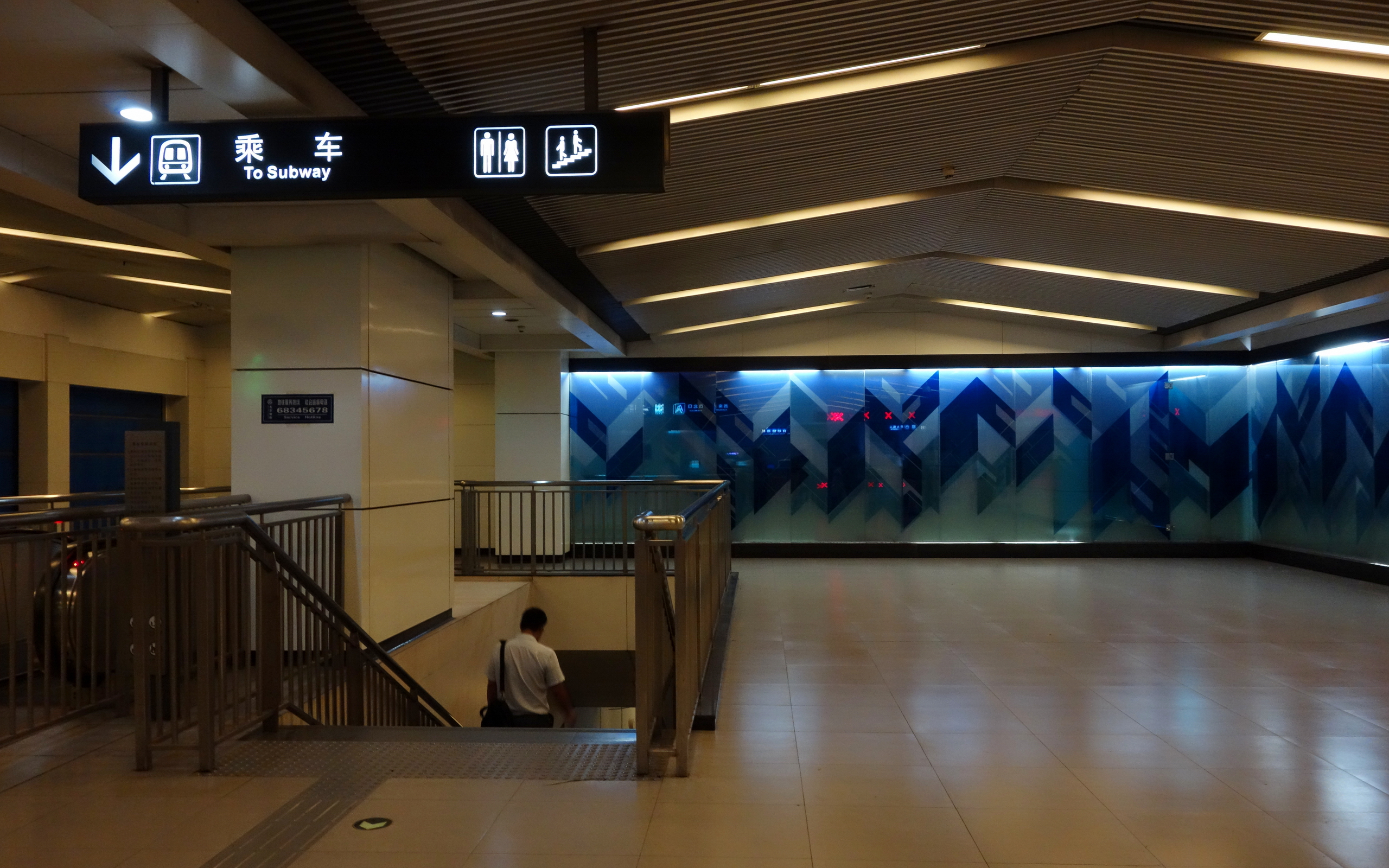 北京地铁10号线西土城站分离式站厅层，墙面装饰抽象的深浅不一的蓝色菱形色块相互重叠图案。